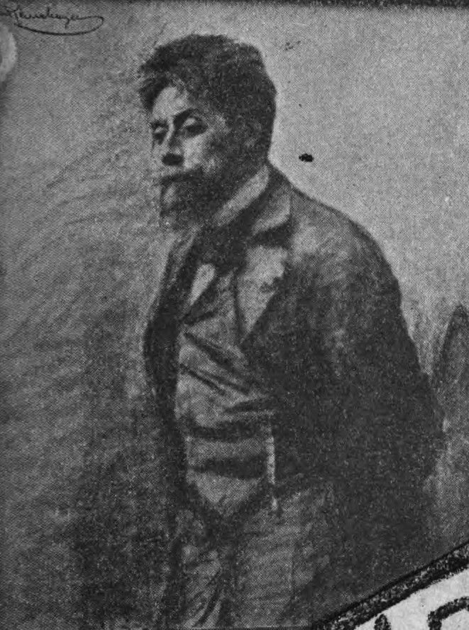 Felix Doermann. In: Sensationen, 2. Auflage. Wien: Weiß, 1897